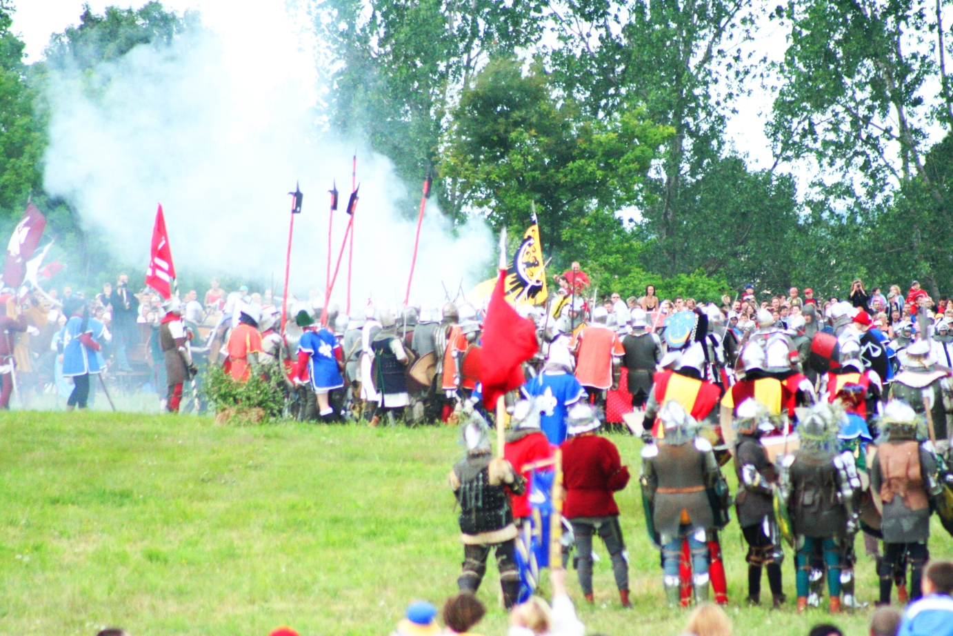 15.07.2006, inscenizacja bitwy pod Grunwaldem.